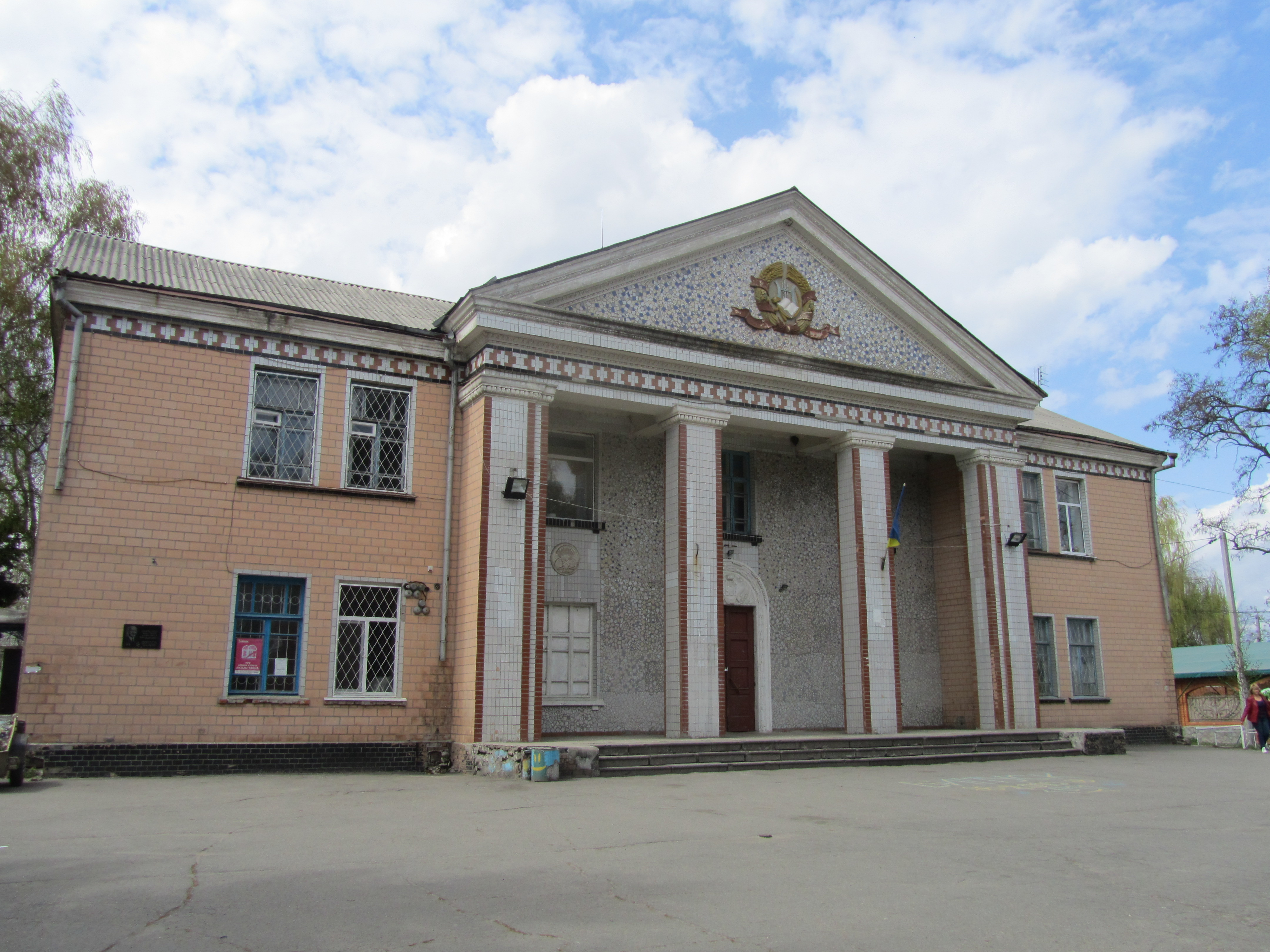 Будинок культури у селі Піщане Кременчуцького району